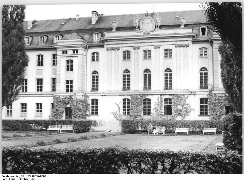 Greifswald, Universität, Gartenseite Zentralbild Löwe 8.10.1956 Zur 500 -Jahrfeier der Universität Greifswald 14. bis 21. Oktober 1956 Am 14. Oktober 1956 beginnt die 500-Jahrfeier der Greifswalder Universität. UBz: Das alte Universitätsgebäude, Gartenansicht.